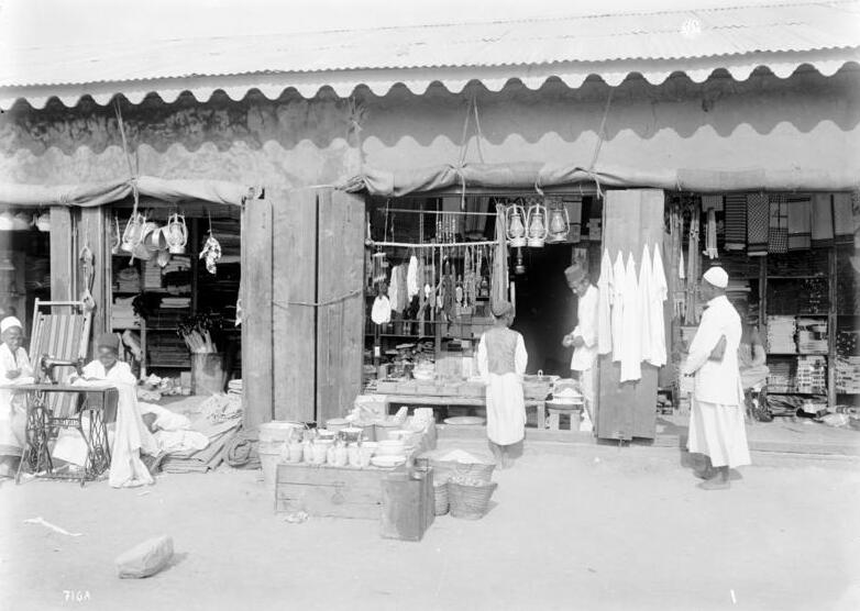 Tabora, Inderläden